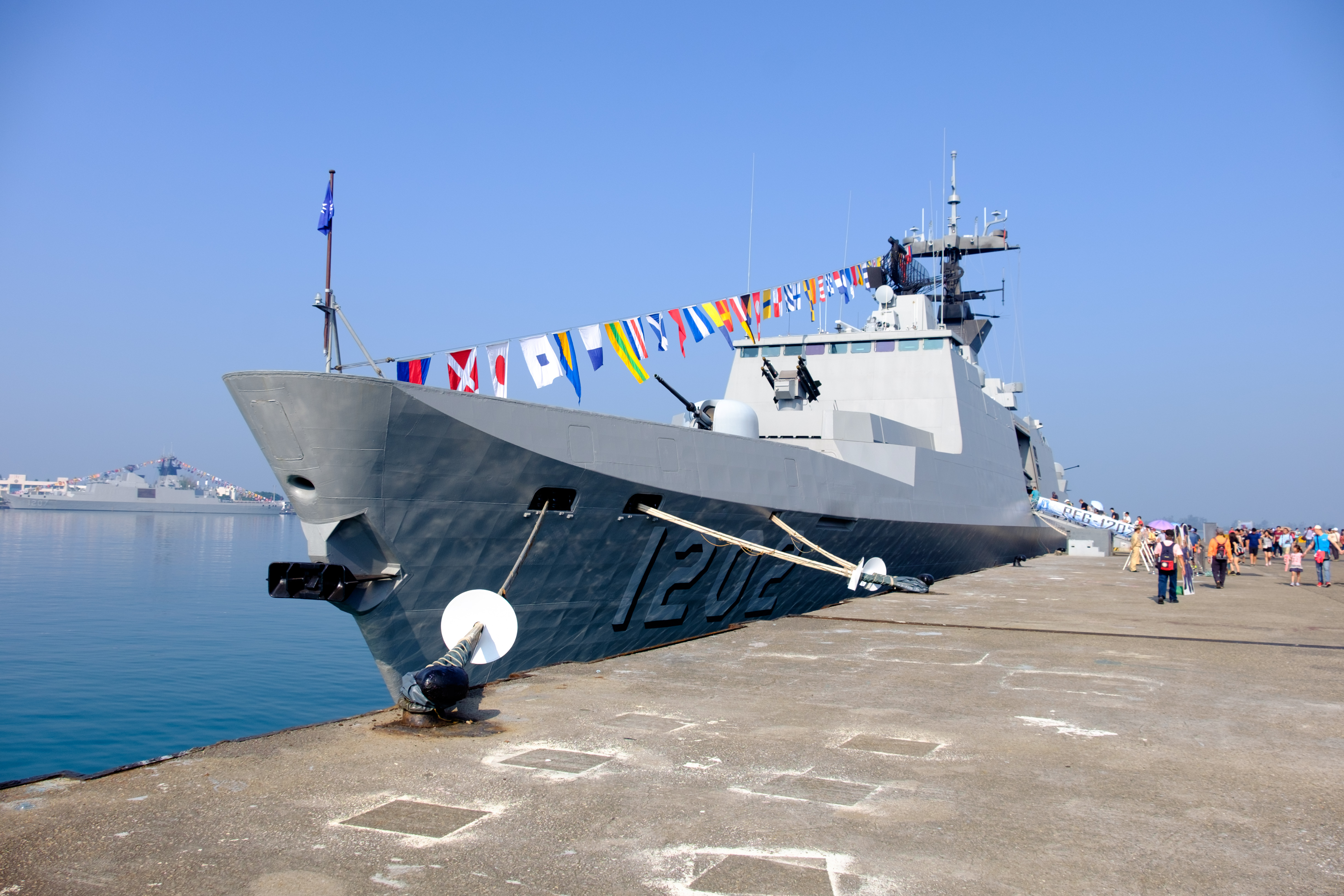 2016年海軍左營軍港營區開放活動上午，東四號碼頭開放參觀中的康定型巡防艦康定（PFG-1202）。